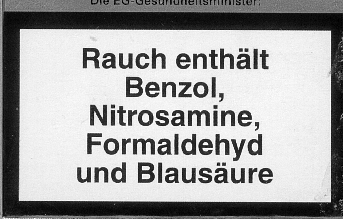 Zigaretten-Warnhinweis mit Schadstoff-Hinweis, von Zigarettenschachtel